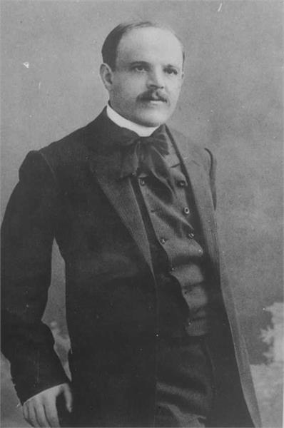 אודסה - חיים נחמן ביאליק